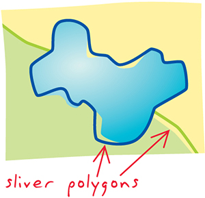 kahe eri kihi kaardi ühendamisel tekkinud digitaalne ebakõla